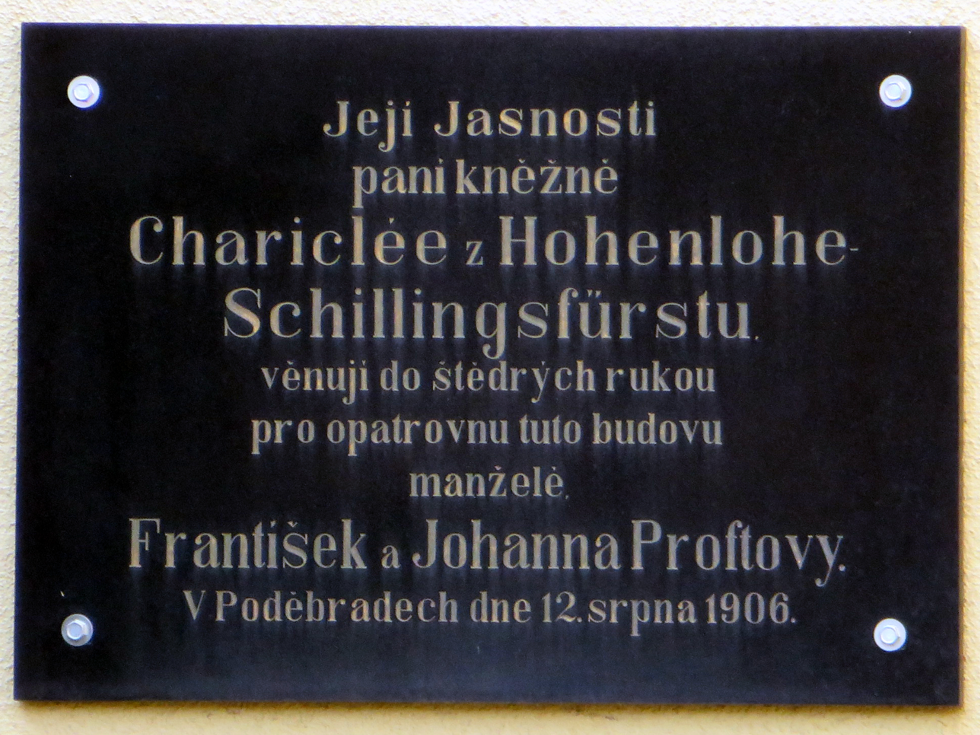 MŠ Proftova v Poděbradech – pamětní deska. GPS: 50.1451539N, 15.1253361E